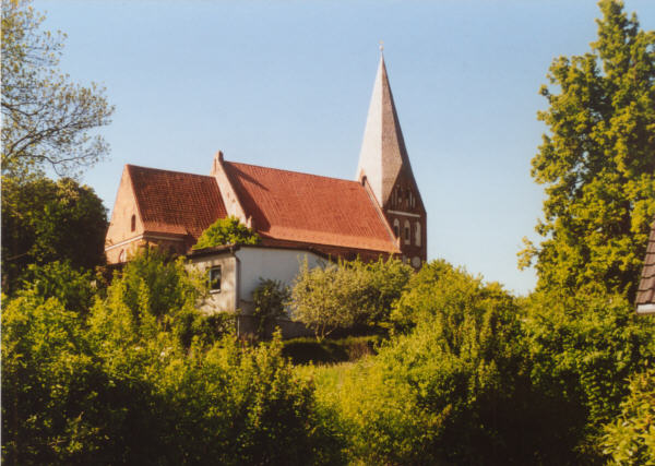 Dorfkirche St. Marien, Poseritz, Insel Rügen, Nordseite